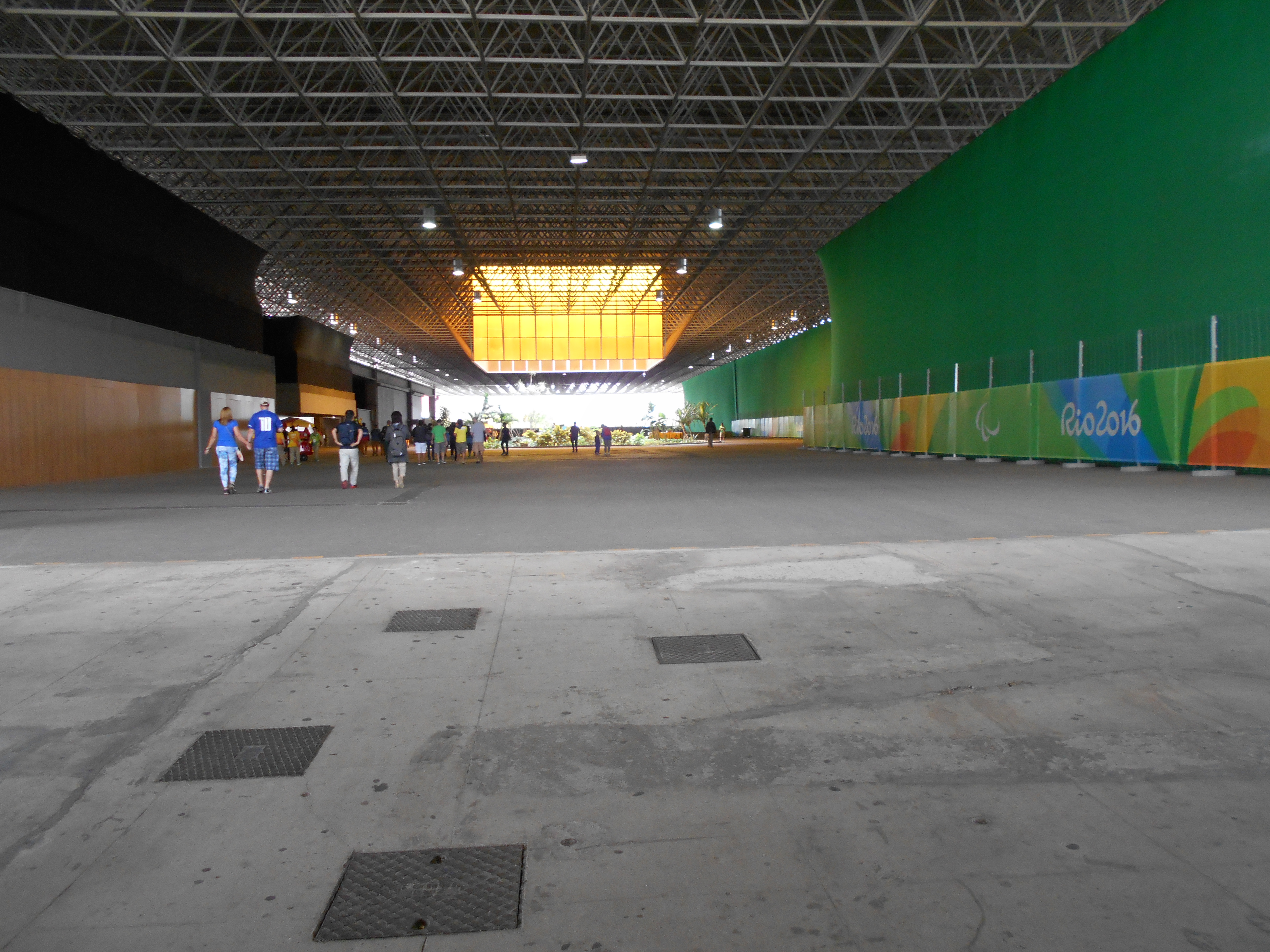 Riocentro recebeu várias competições durante os Jogos Paraolímpicos Rio 2016.